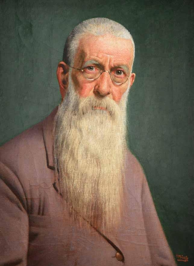 Friedrich Mies autoportret